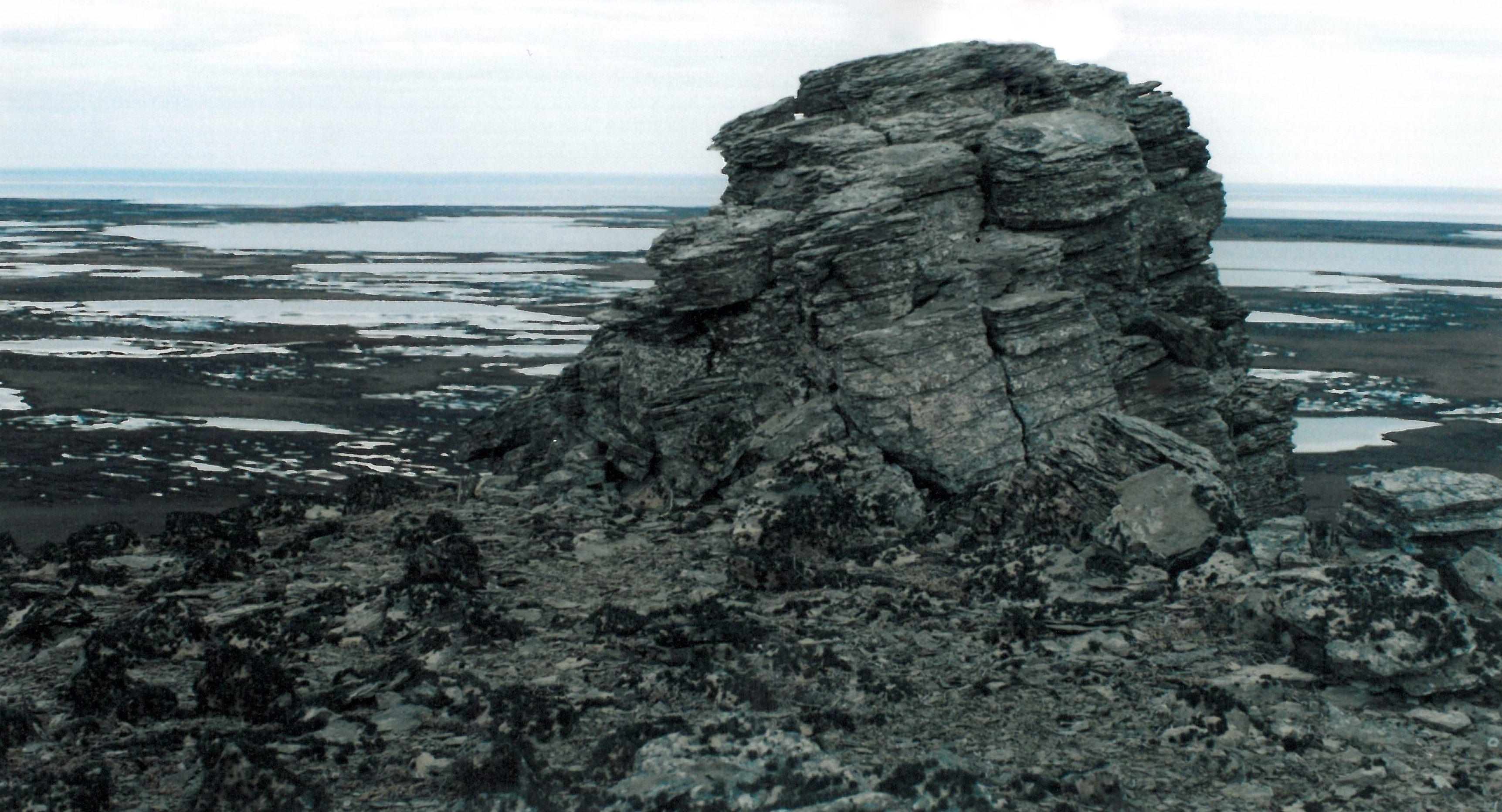 Vue sur les étangs de la péninsule Courbet depuis le sommet du mont Bungay